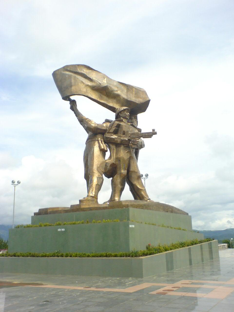 Weekend dans ce lieu historique. Au programme, beau temps, rencontres, moto, et un peu d'histoire.